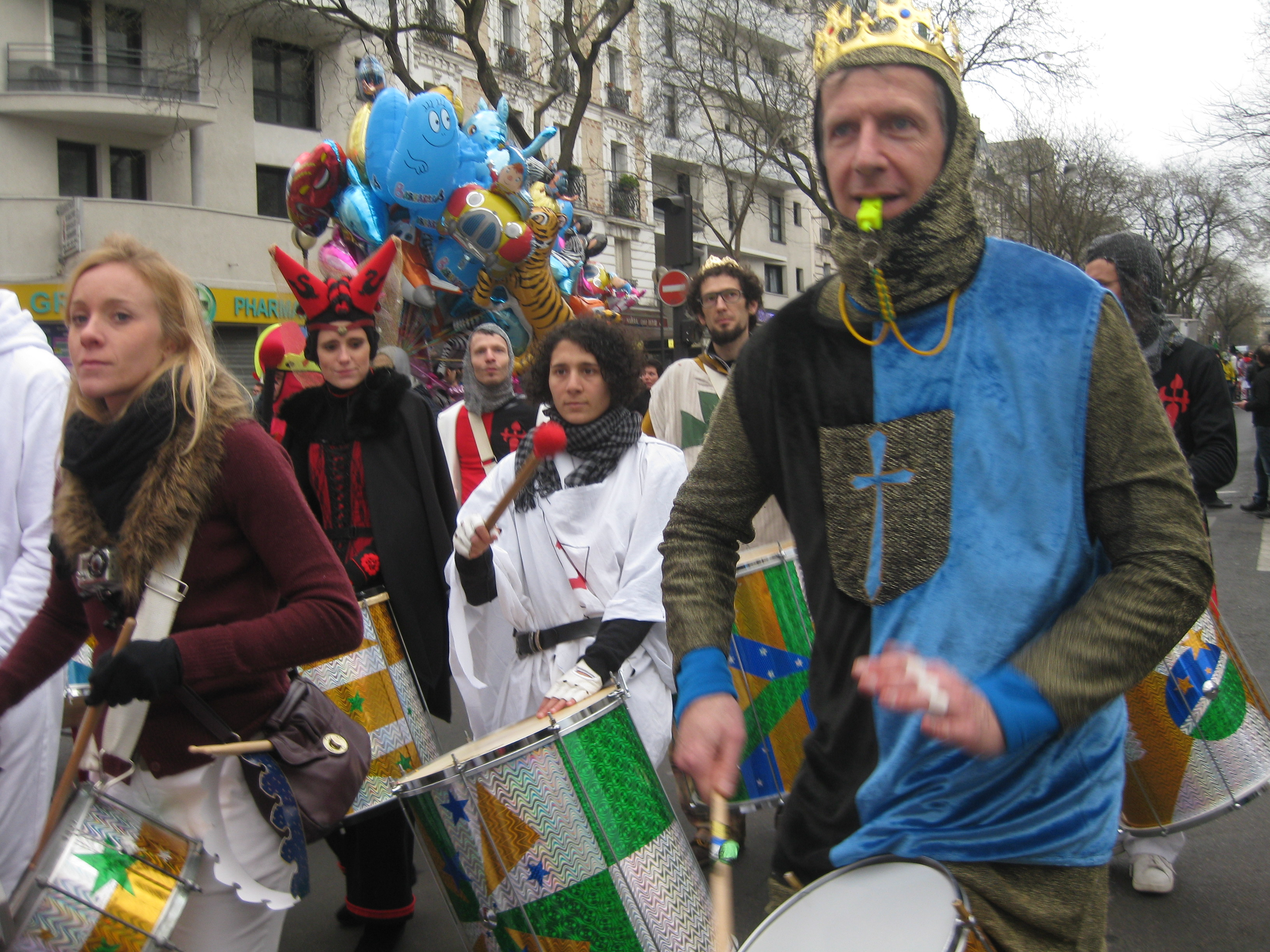 carnaval de Paris, balade du bœuf gras